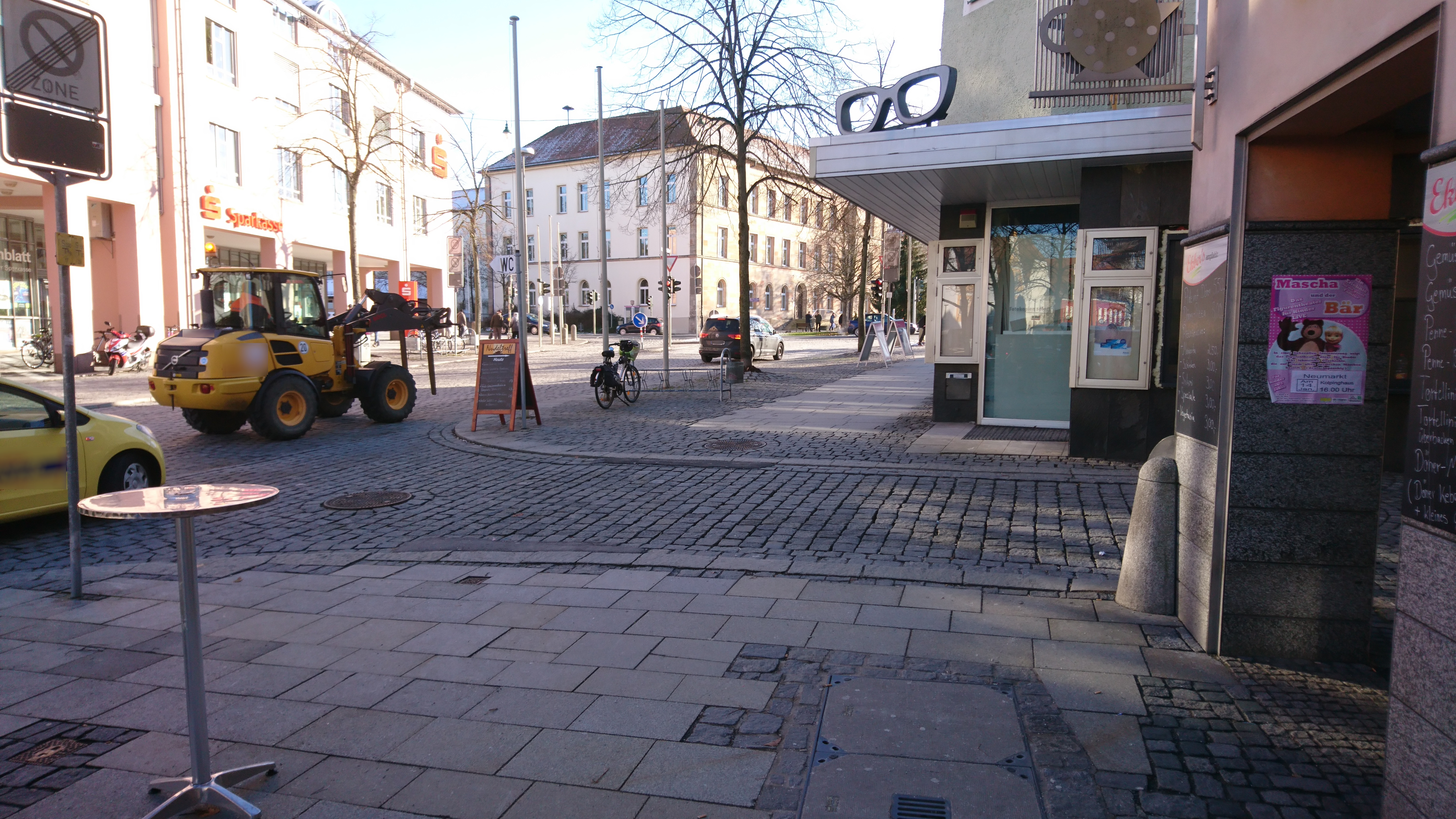 Blick auf die Kreuzung am oberen Markt (ehemals oberes Tor) von der Perspektive des Wohnhauses von Veit Jung aus